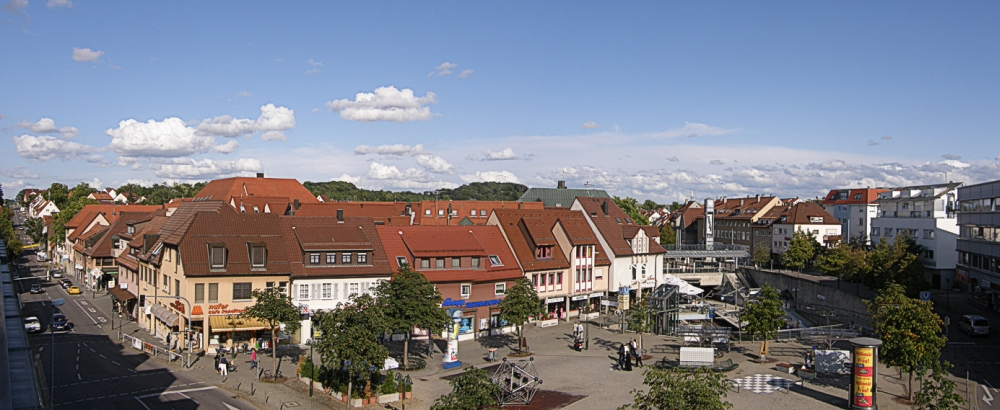 Der Löwenmarkt in Stuttgart Weilimdorf